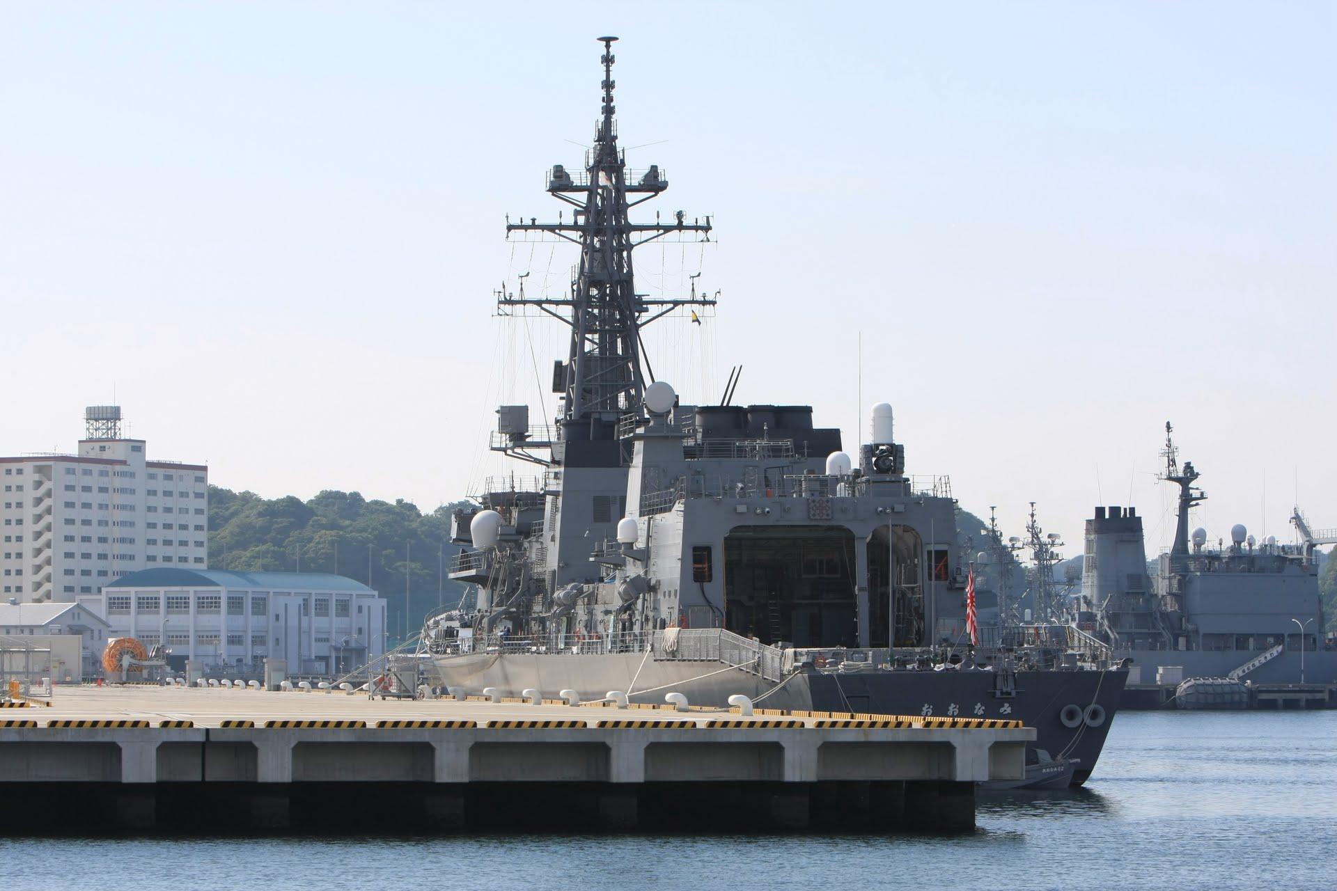 横須賀・逸見岸壁に係留中の護衛艦おおなみ。